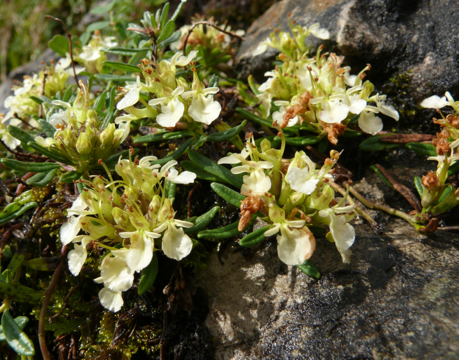 Teucrium montanum, Allgäuer Alpen, Germany